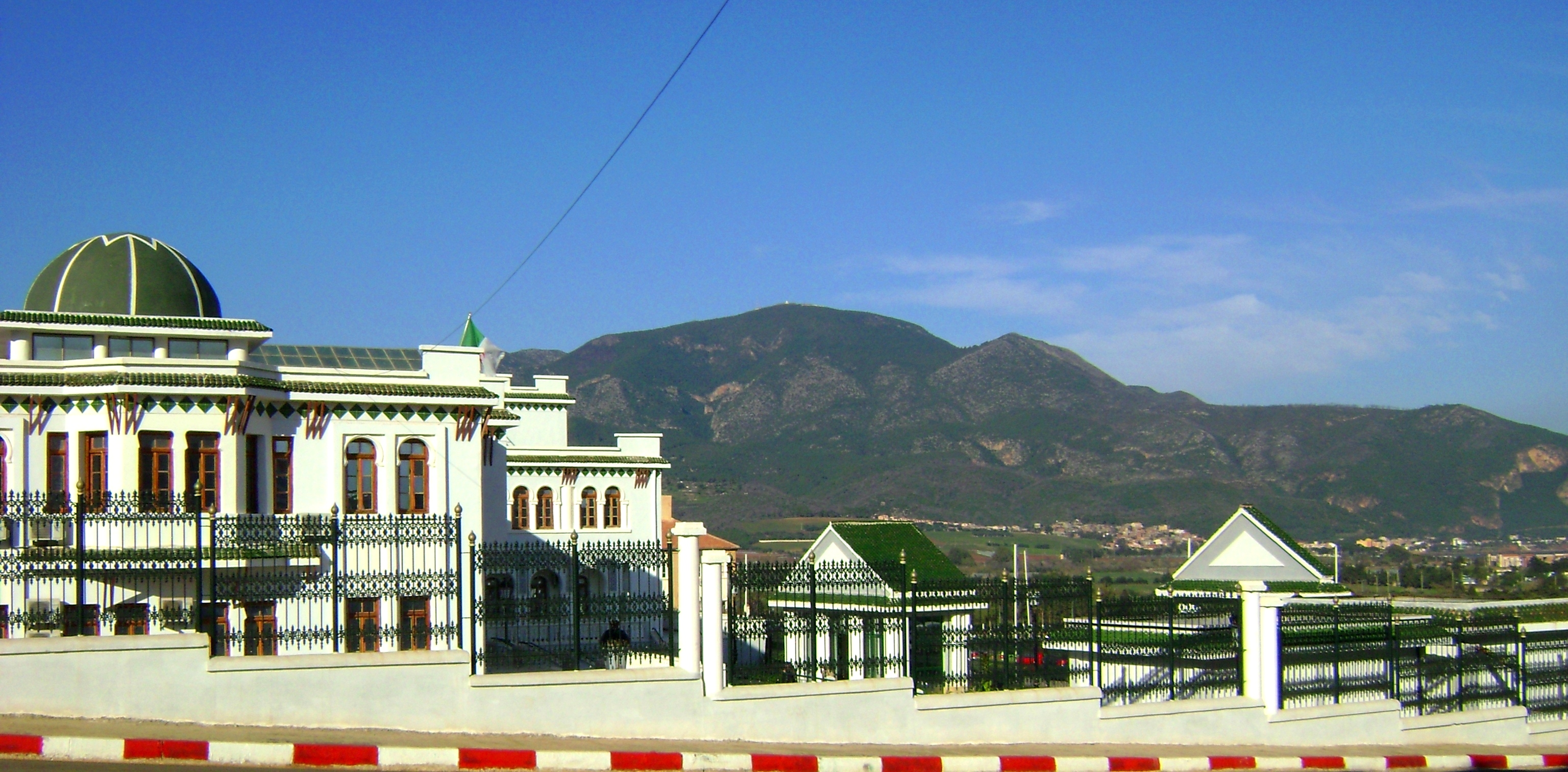 La Mairie de TIPAZA - vue vers le mont CHENOUA.